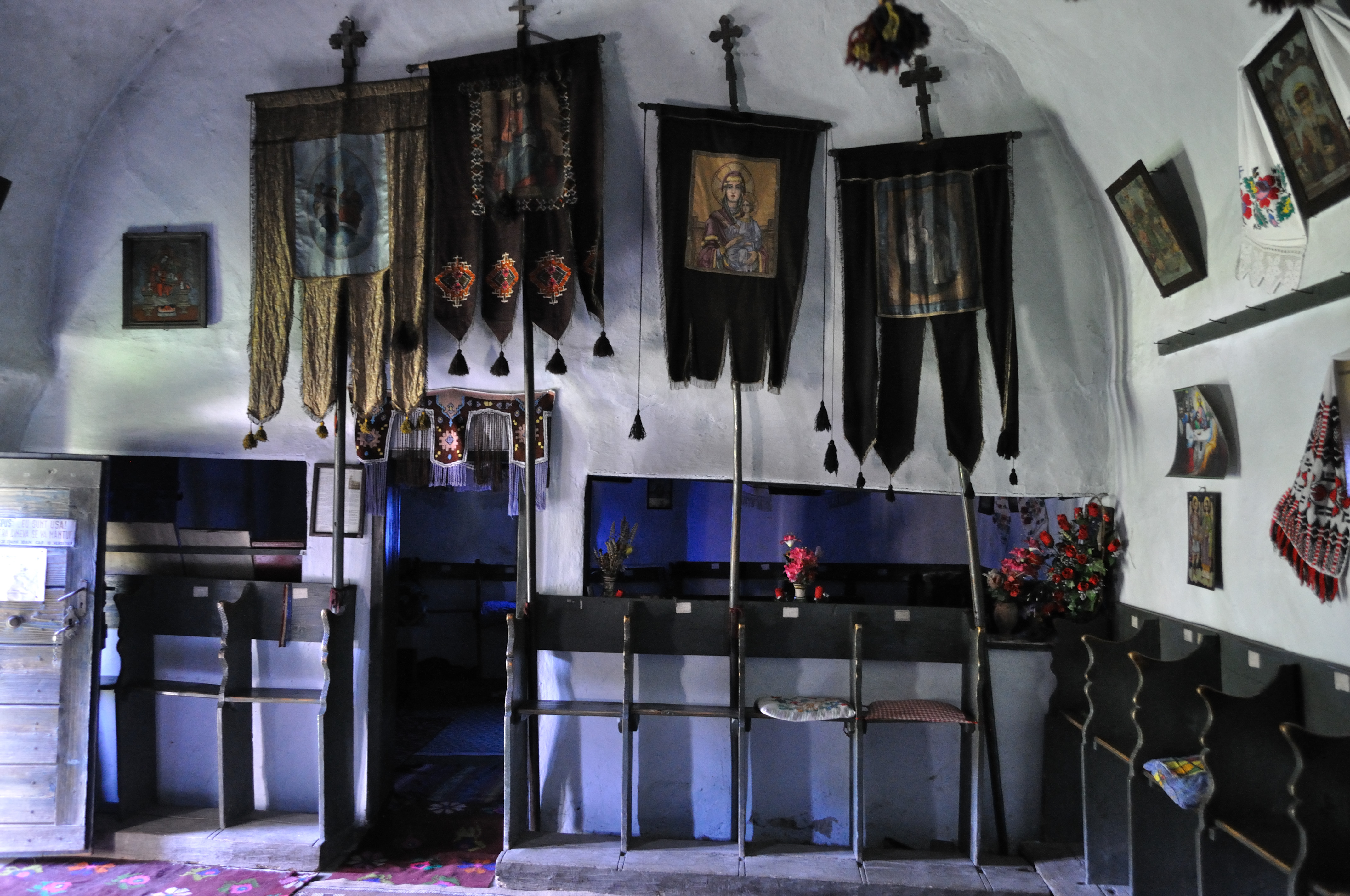 Biserica de lemn „Sfinții Arhangheli Mihail și Gavriil” din Almașu Mic de Munte, județul Hunedoara